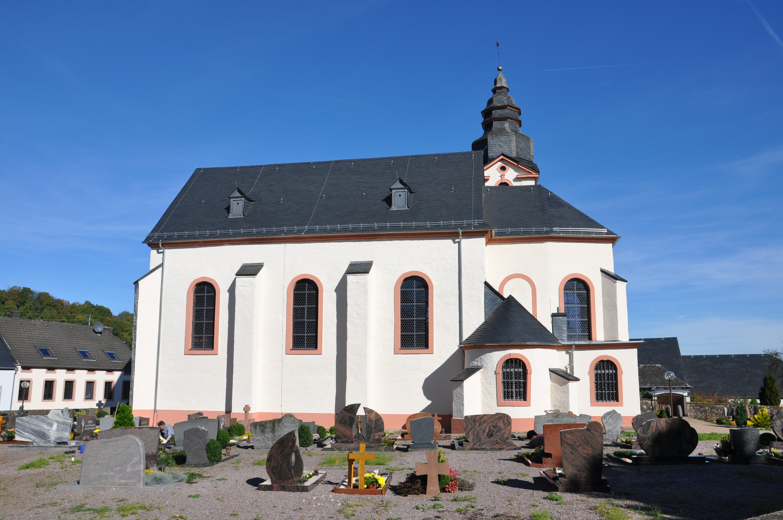 Newel-Butzweiler, St. Remigius